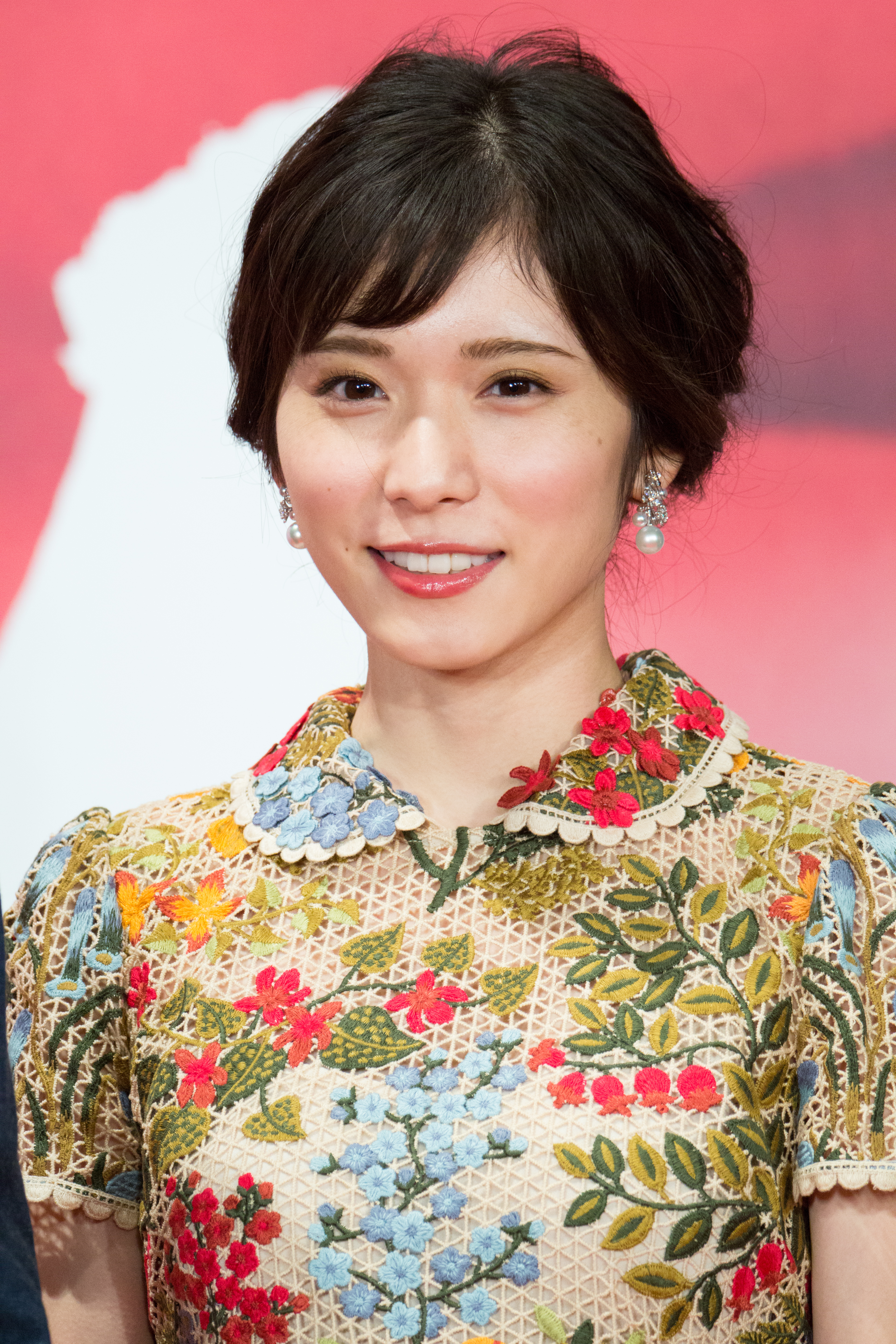 第30回 東京国際映画祭 オープニングセレモニー 松岡茉優（『勝手にふるえてろ』）